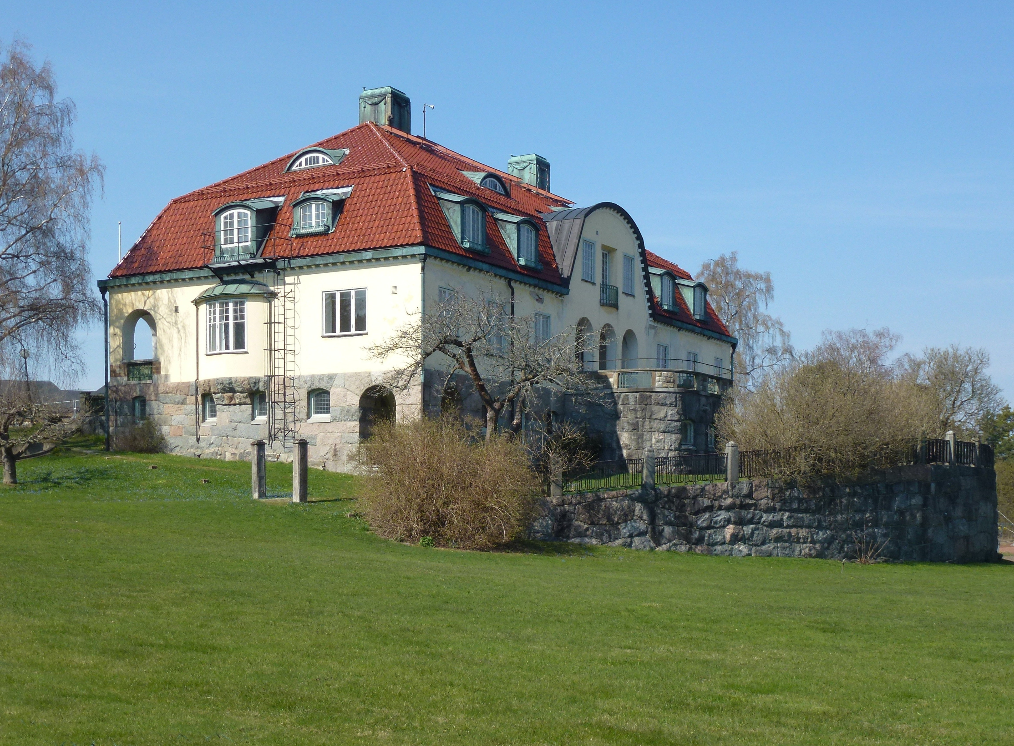 Lilla Erstagården, Otto Neumüllers villa byggd 1906, arkitekt Edvard Bernhard